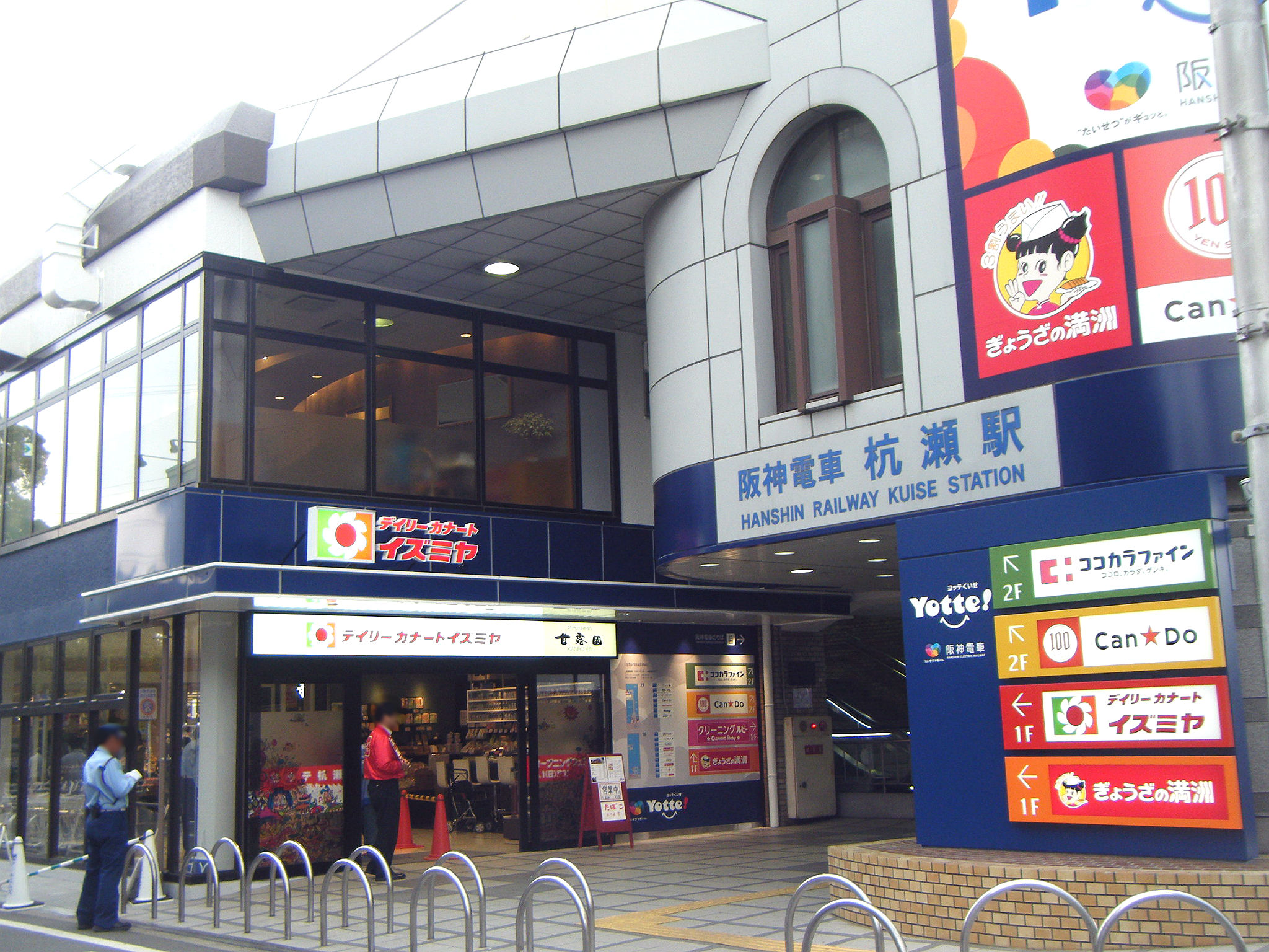 阪神杭瀬駅にオープンした商業施設「Yotte杭瀬」。